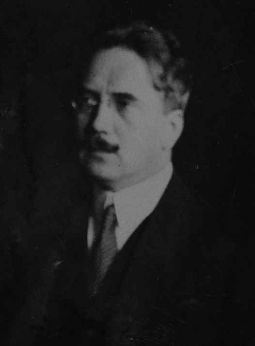 Stanisław Kot